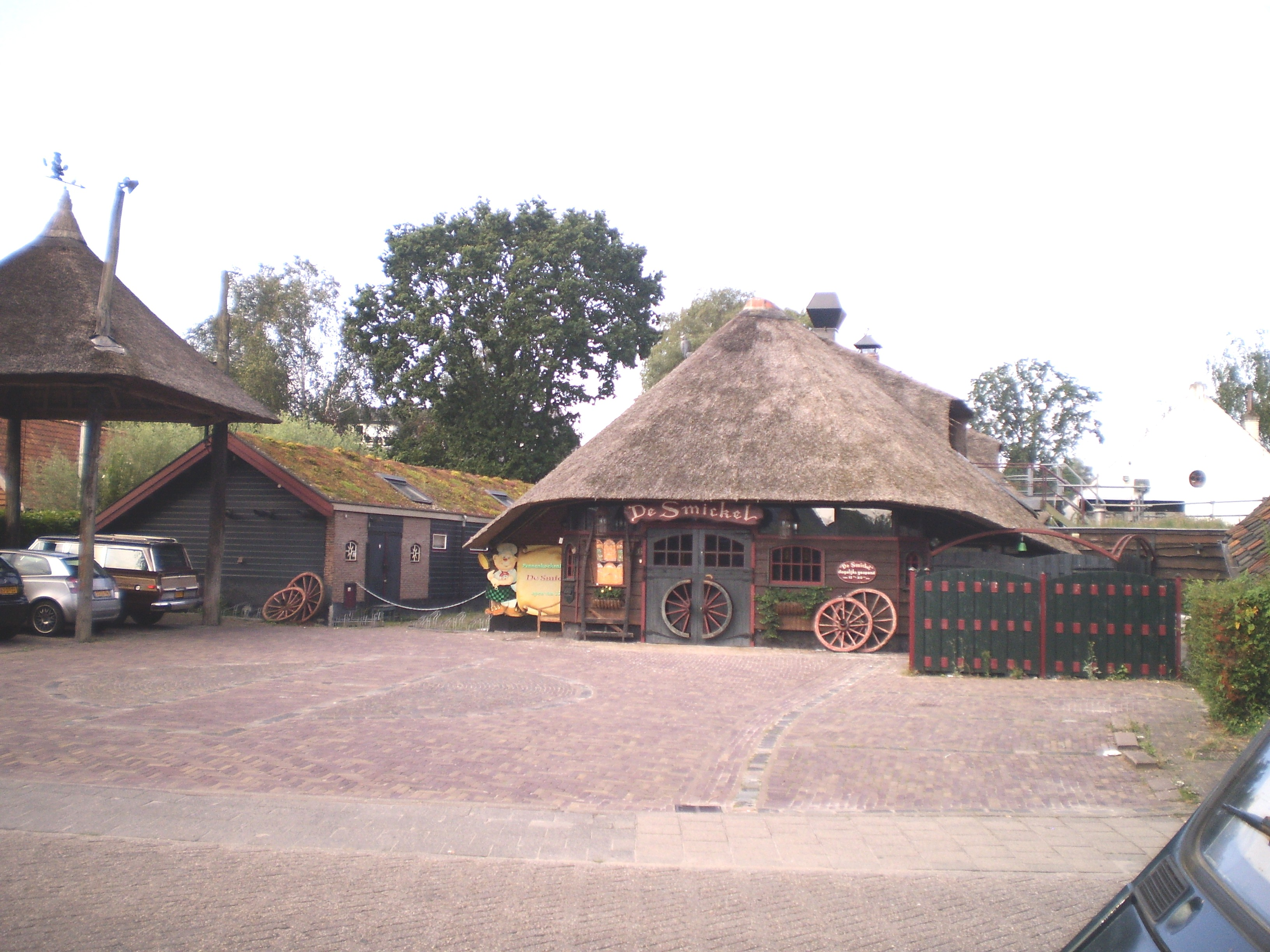 Vanaf De Brinkweg